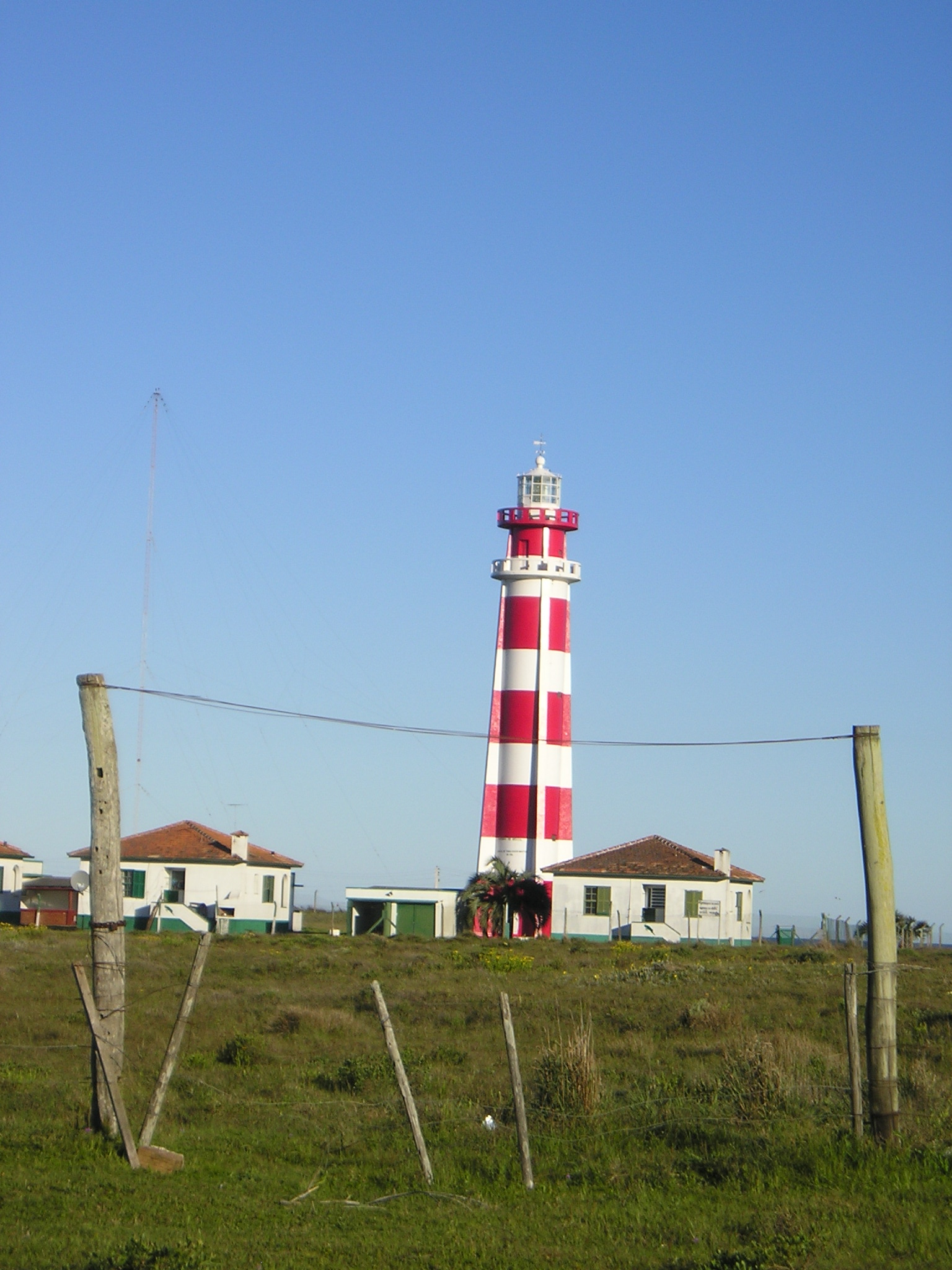 (French) Farol (phare) de la Barra do Chuí, sur le territoire municipal de Santa Vitória do Palmar, Rio Grande do Sul, Brésil. Médiocre qualité, mais je ne suis pas un professionnel de la photographie... Bien à vous.